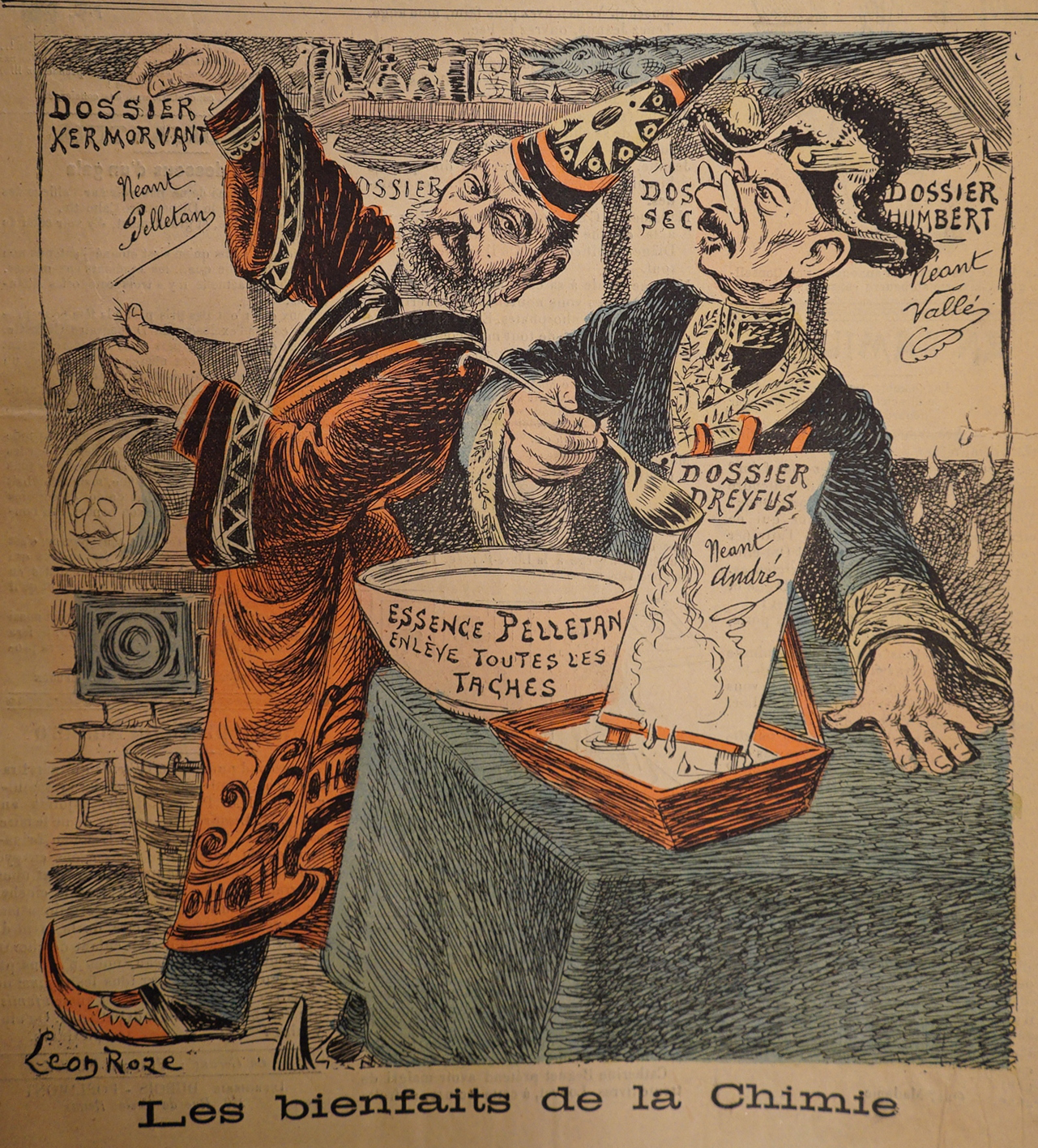 journal l'étrille dans le fond de la bibliothèque de reims.